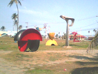 Esculturas do Parque Metropolitano de Pituaçu, Salvador, Bahia, Brasil.